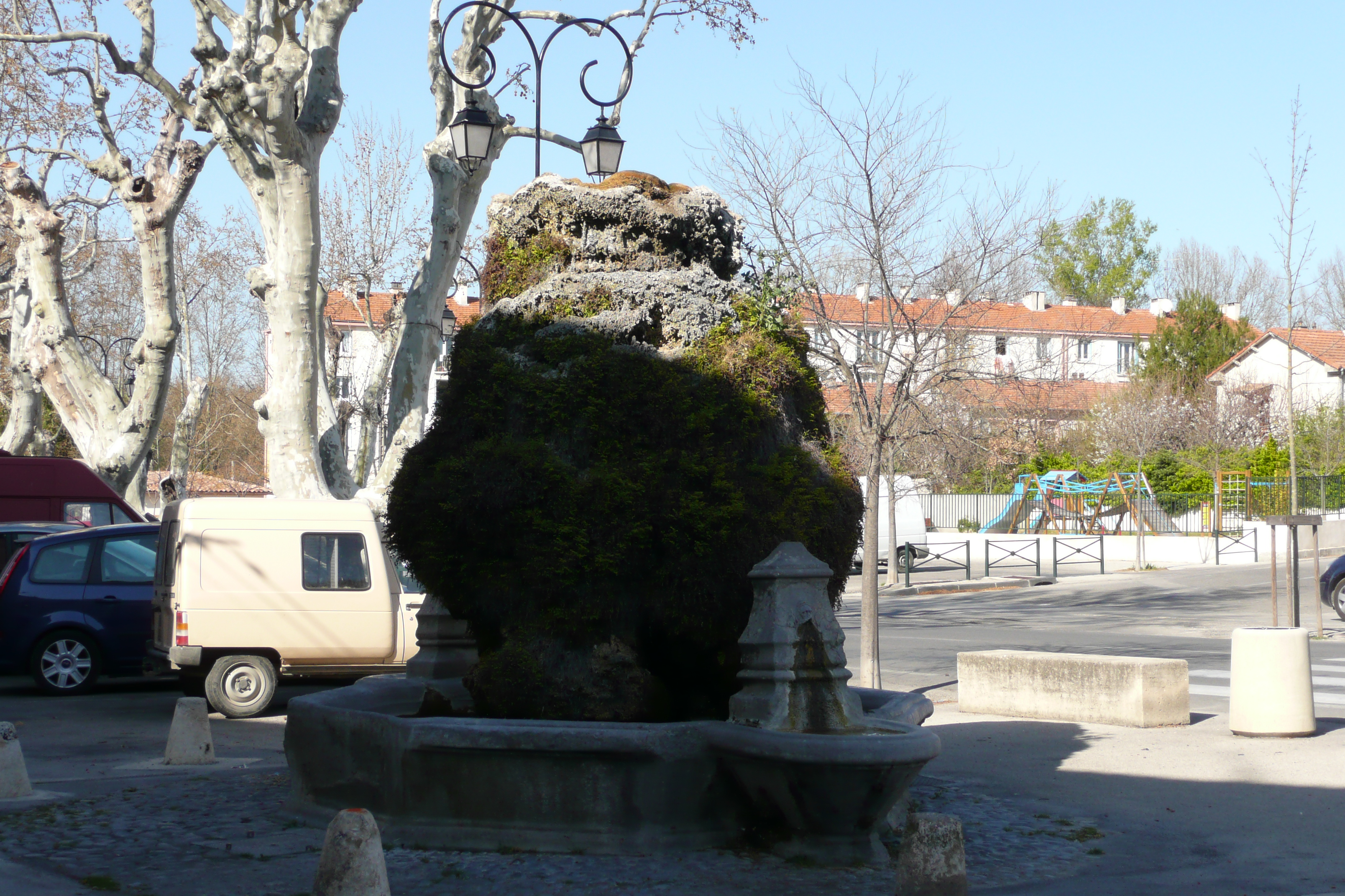 Fontaine à Pernes-les-Fontaines